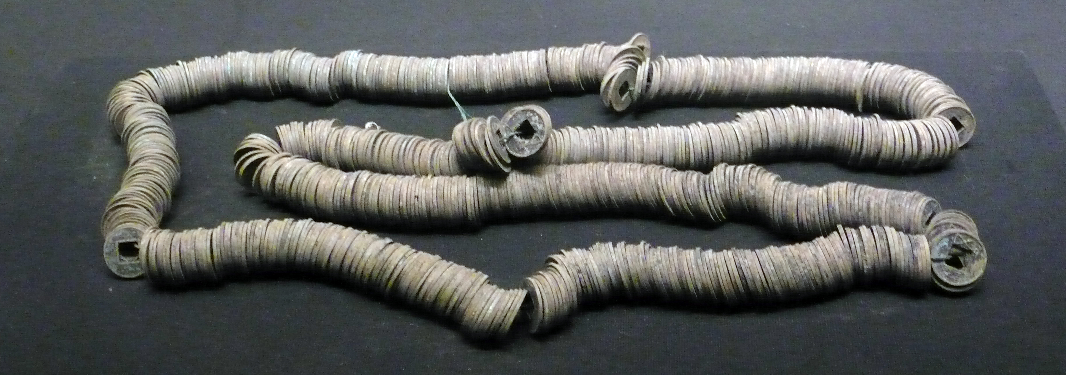 五铢钱，一贯（一千枚）。海昏侯国遗址出土。首都博物馆临展。